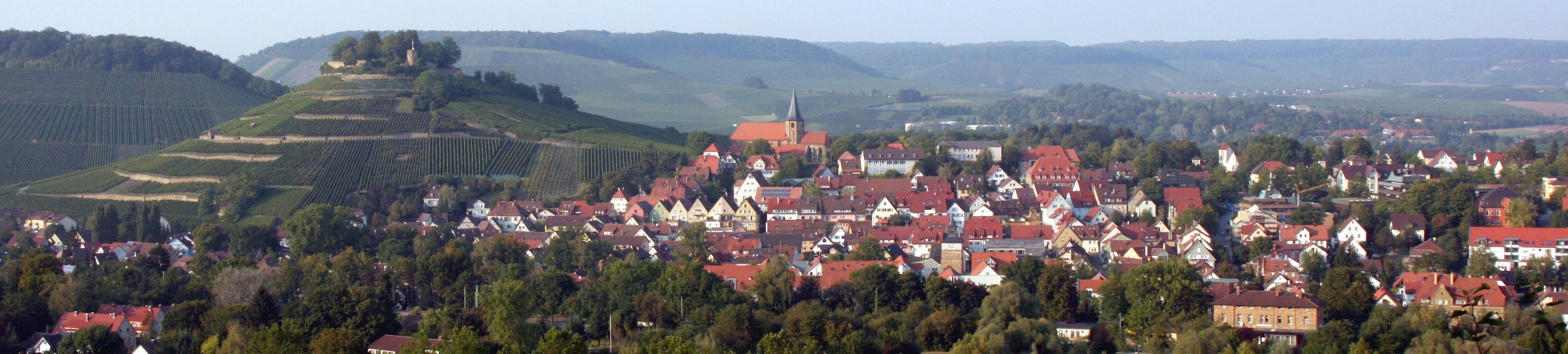 Weinsberger Kernstadt von Süden von erhöhtem Standpunkt